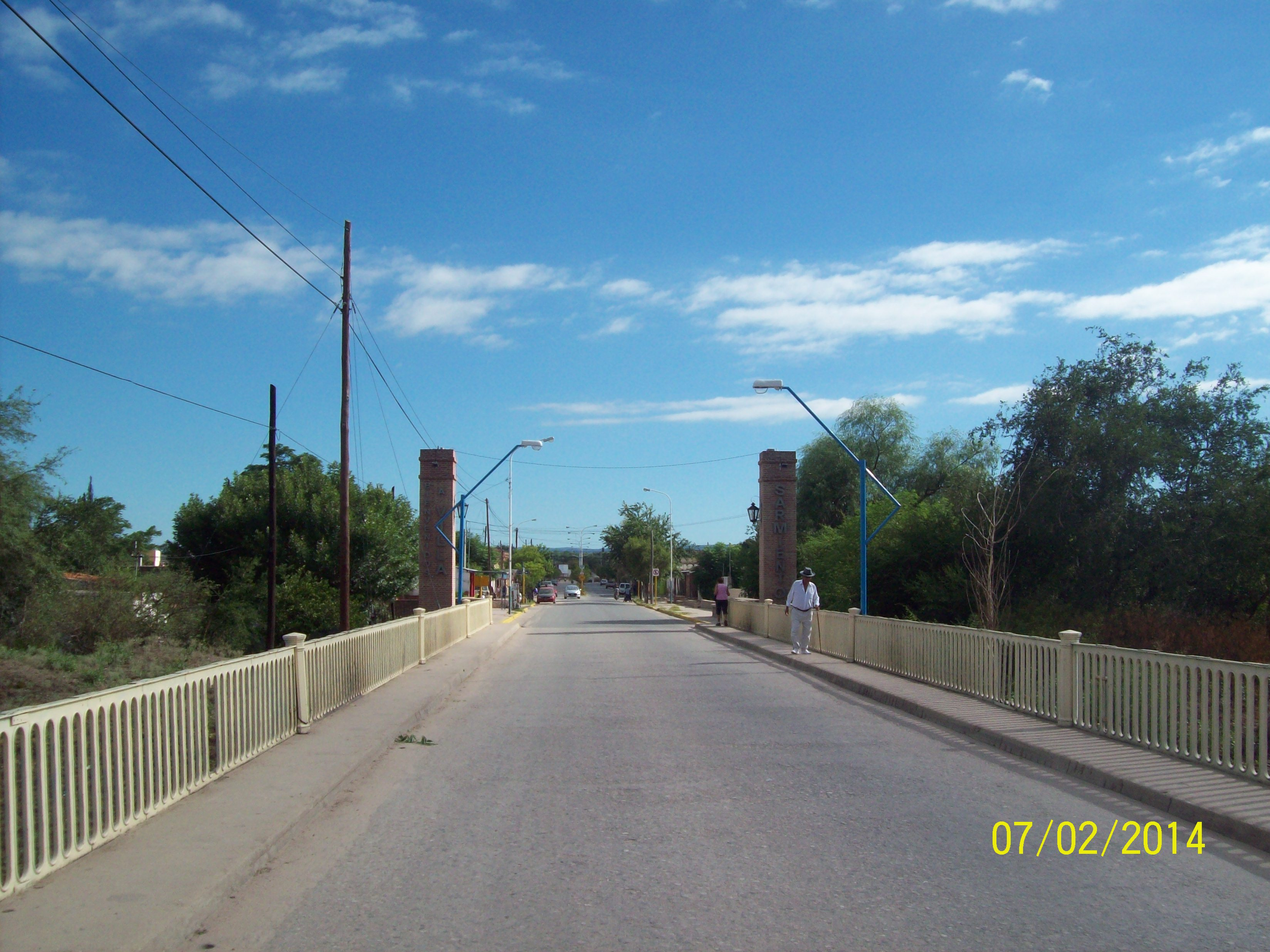 Puente divisor entre Villa Sarmiento y Villa Dolores, Córdoba.